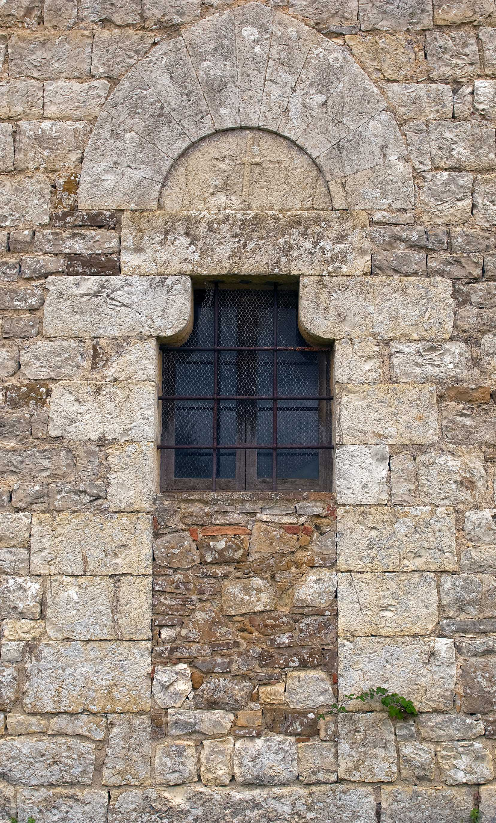 Portale destro della chiesa di San Giorgio allo Spadaio - Barberino Val d'Elsa - Firenze